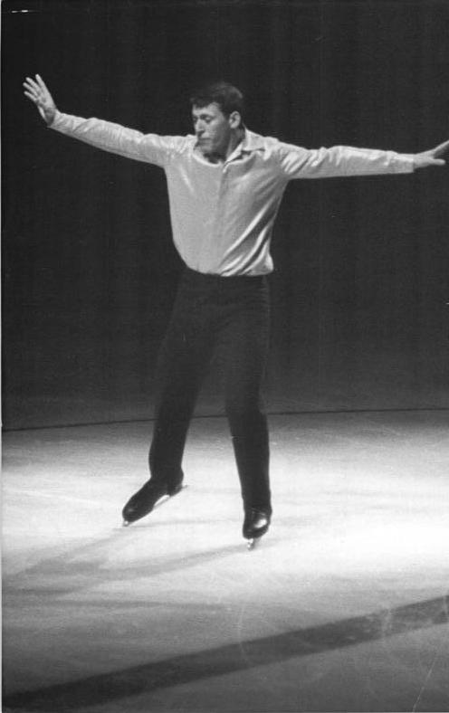 Alain Calmat Zentralbild Kohls 14.10.1963 Festtag des Eissports Am Geburtstagsabend unserer sozialistischen Sportbewegung (13.10.1963) überbrachte die Kunstlauf-Elite Frankreichs, Österreichs und der DDR in der Berliner Werner-Seelenbinder-Halle noch ein besonderes Präsent: Gemeinsam Klasseleistungen. UBz: Alain Calmats (Europameister-Frankreich) schmissiger" Mackie-Messer-Tanz" gefiel dem Berliner Publikum ganz ausgezeichncet.